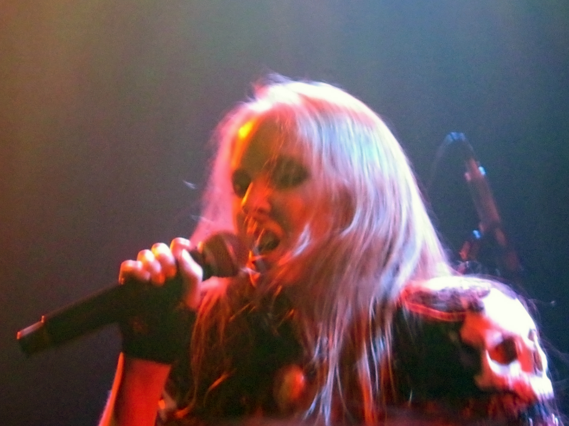 אינפי סנאו, זמרת מטאל ישראלית. 2015